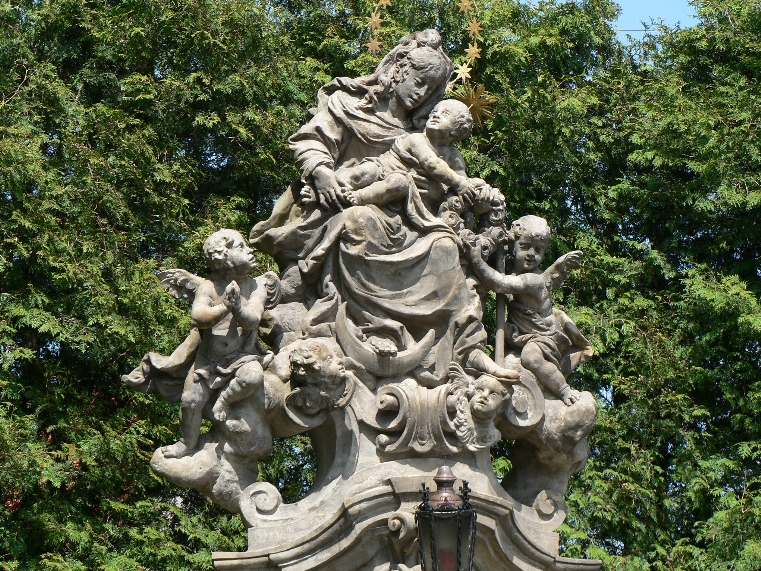 Sousoší Panny Marie v Dolním Újezdu (J. F. Pacák, 1737)